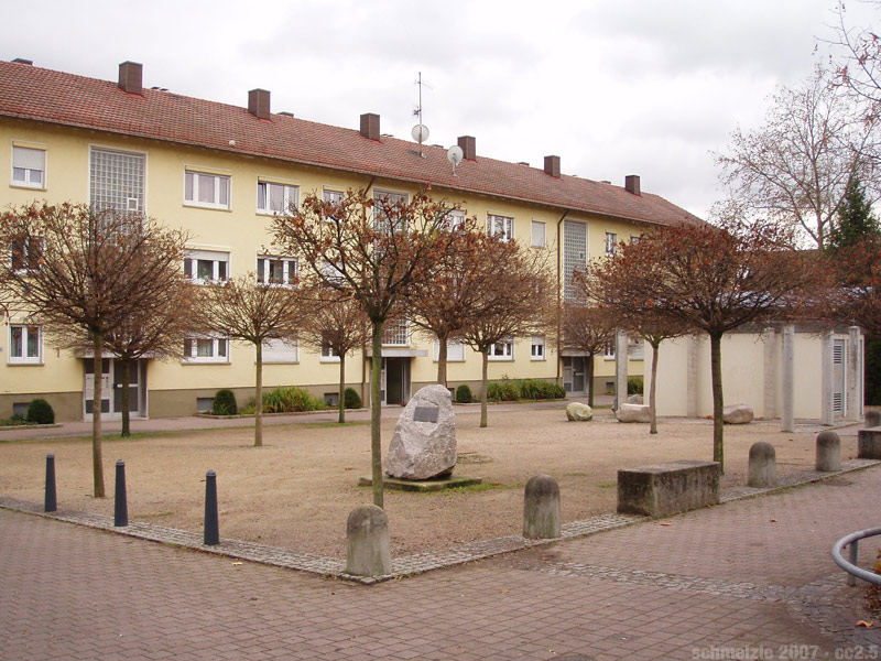 Gedenkstein für die Opfer des Luftangriffs auf Heilbronn-Böckingen am 10. September 1944, errichtet am Dorfplatz in Böckingen im Jahr 2004